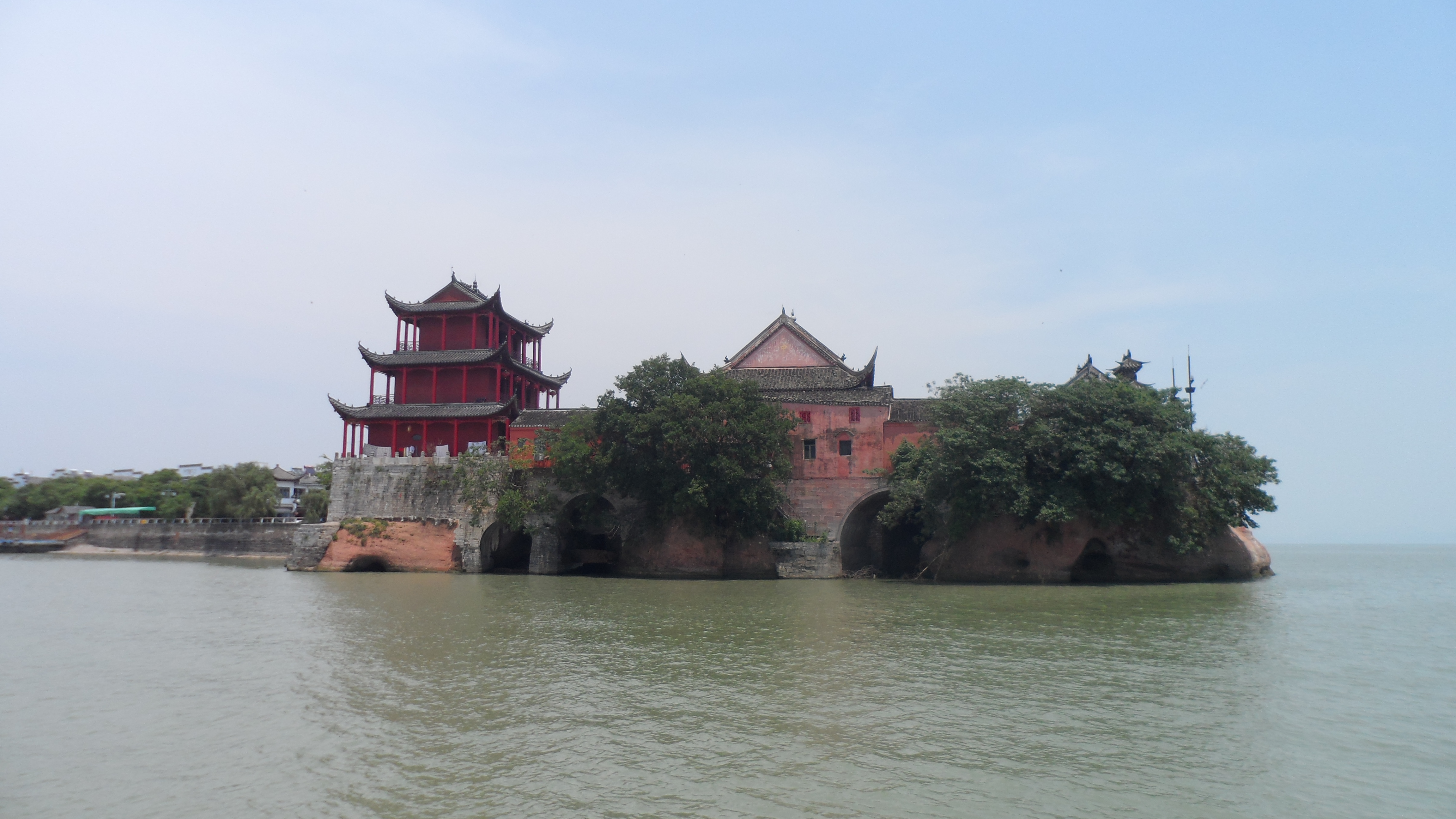 安徽巢湖中庙